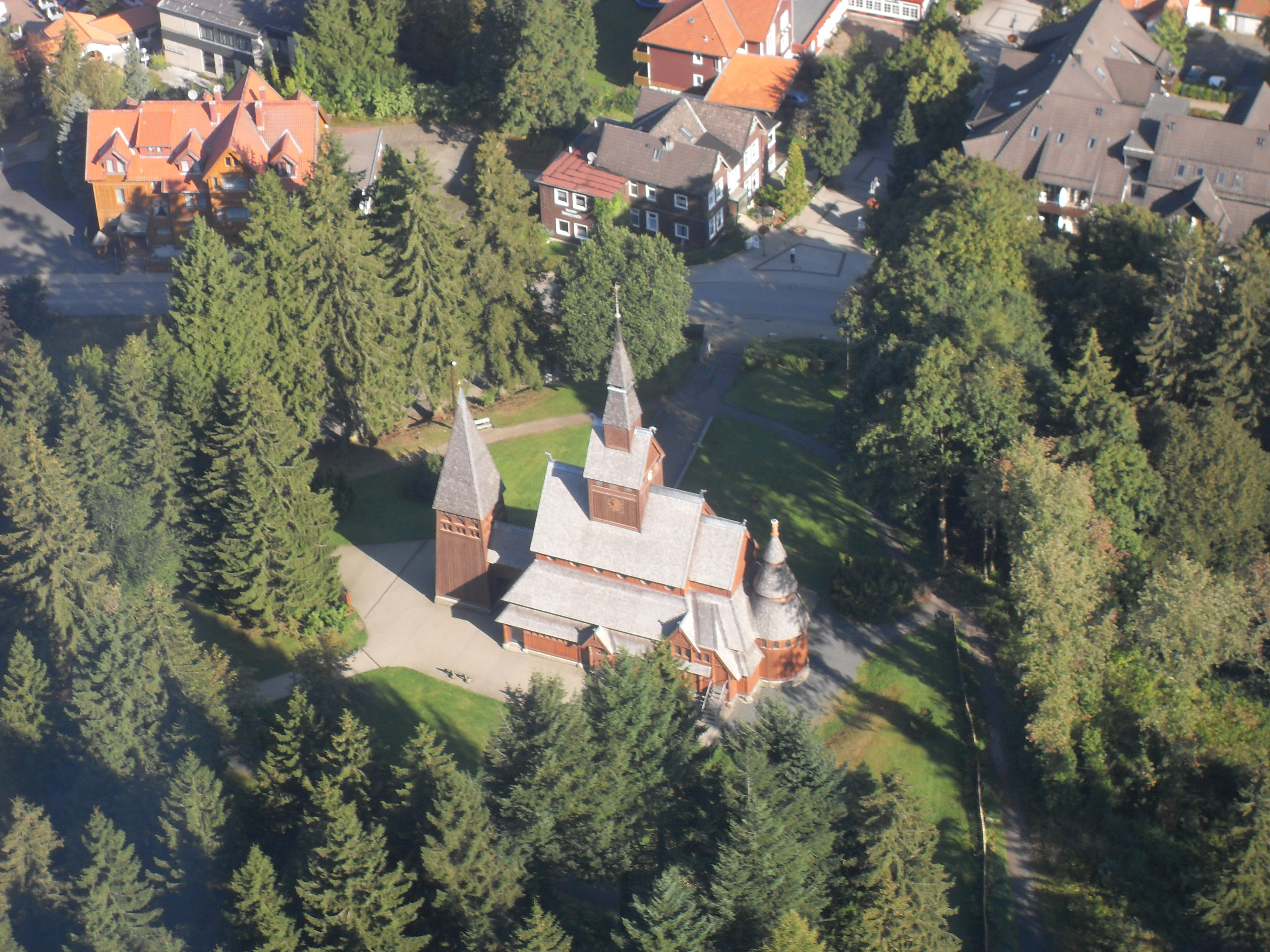 Luftbild: Stabkirche Hahnenklee, Südseite